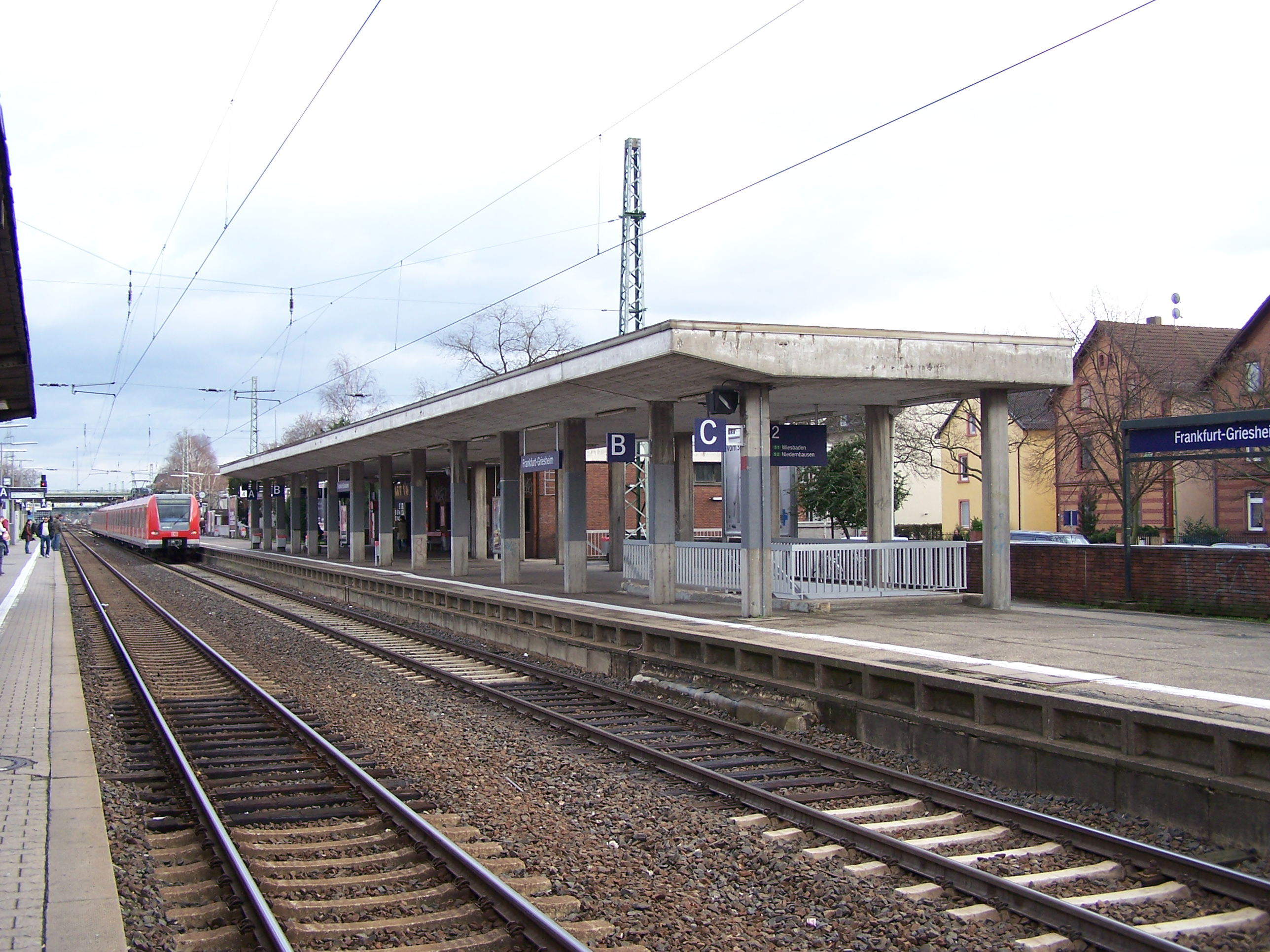 Hausbahnsteig des Bahnhofs Frankfurt-Griesheim mit stadteinwärts fahrender S-Bahnlinie 1.